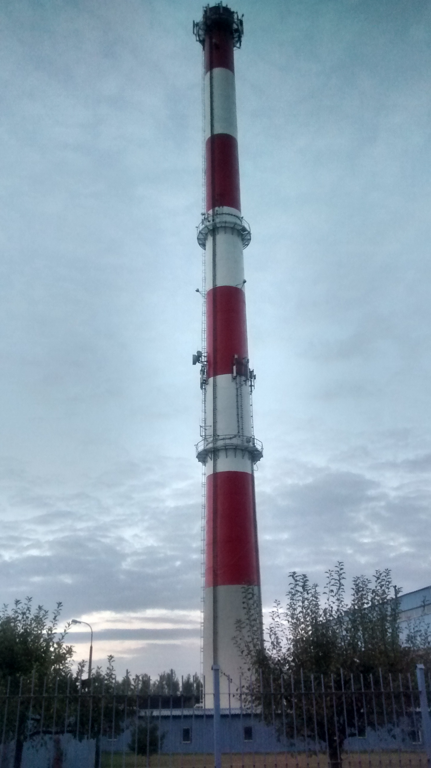 Komin Energetyki Cieplnej w Skierniewicach